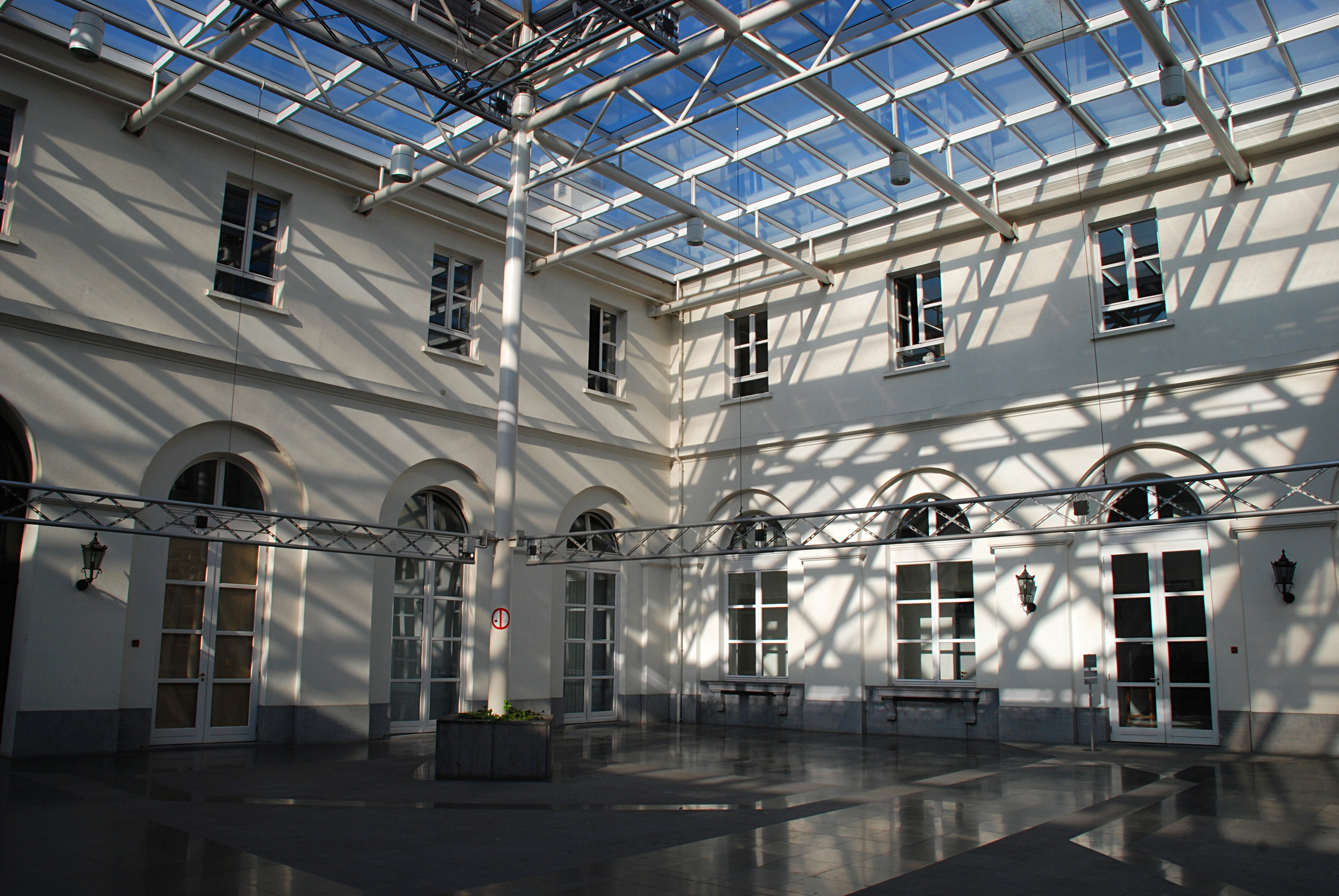 Belgique - Bruxelles - Écuries royales